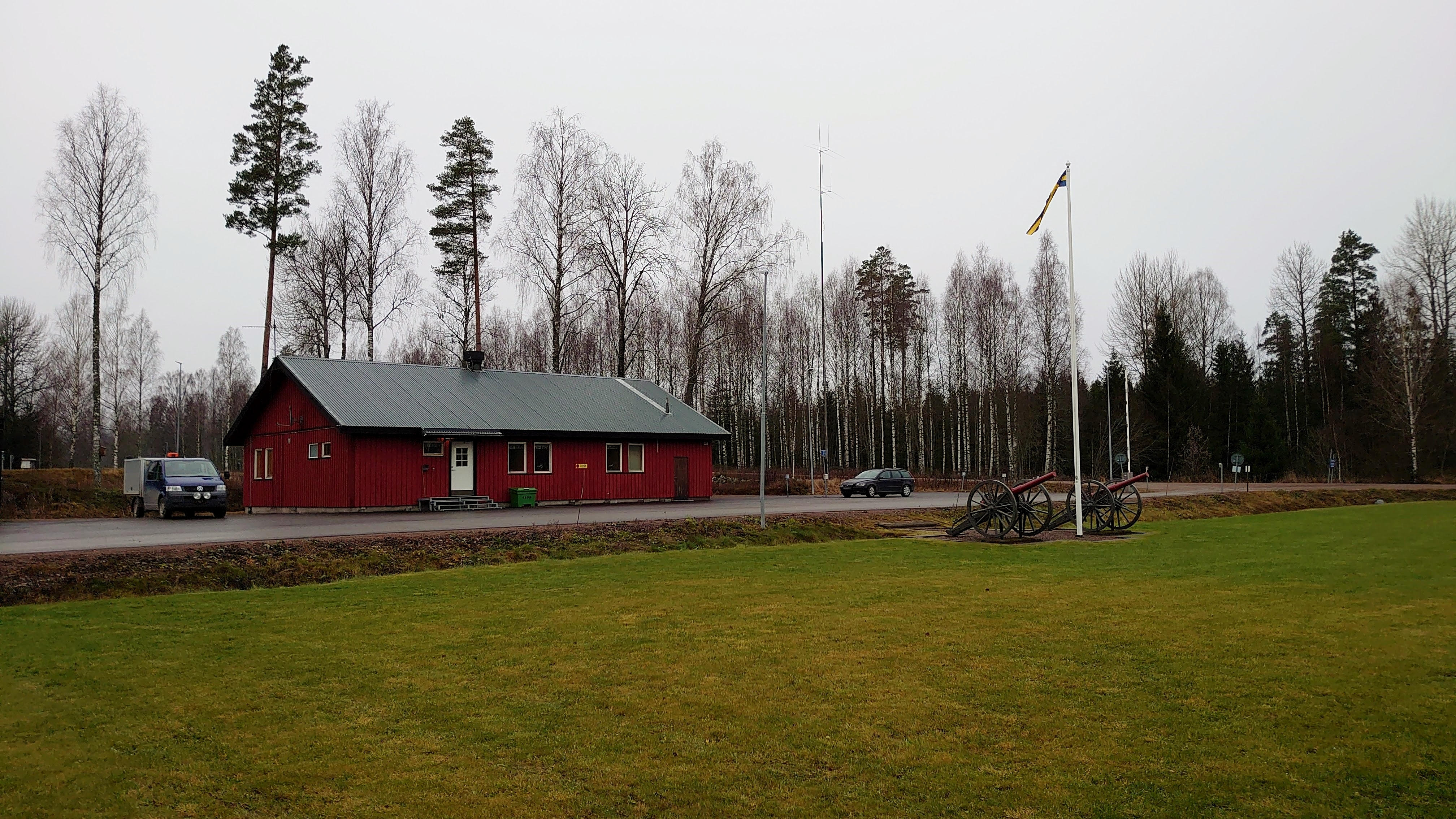 Infartsvägen vid Horssjöns skjutfält. St med skjutfältsexpeditionen.